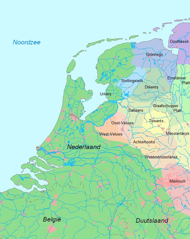 A hollandiai nyugati alnémet nyelvjárások térképe